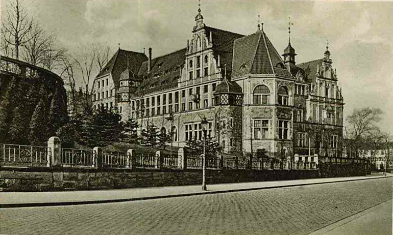 Murhardsche Bibliothek 1917